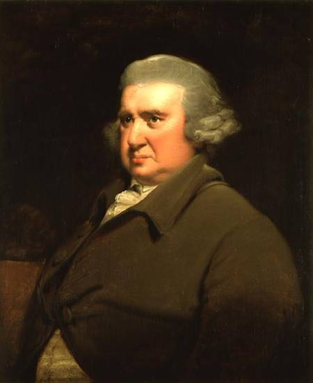 Erasmus Darwin